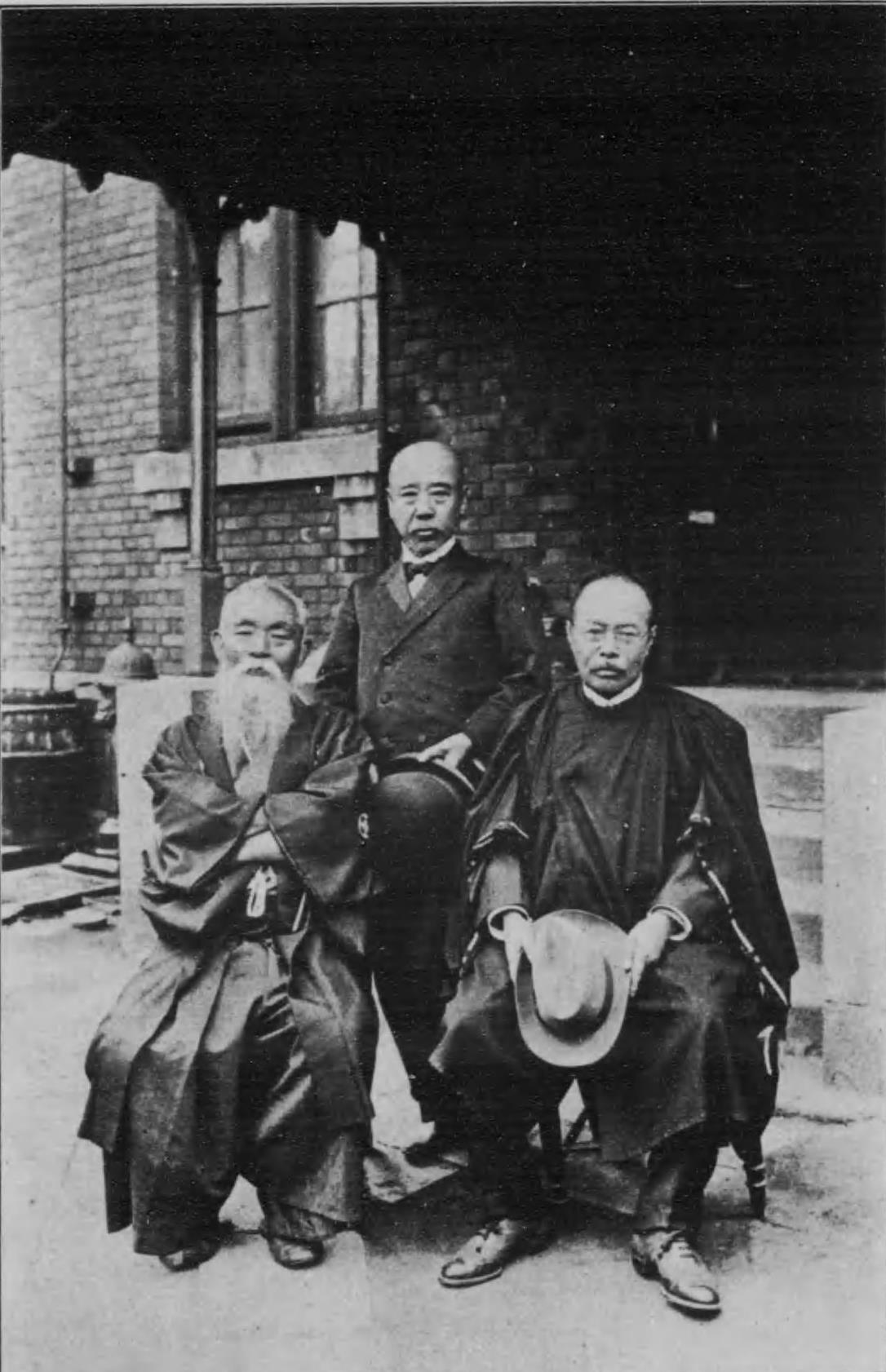 第一高等学校30年以上勤続教授（大正9年） 右から保志虎吉、吉田謙次郎、塩谷時敏